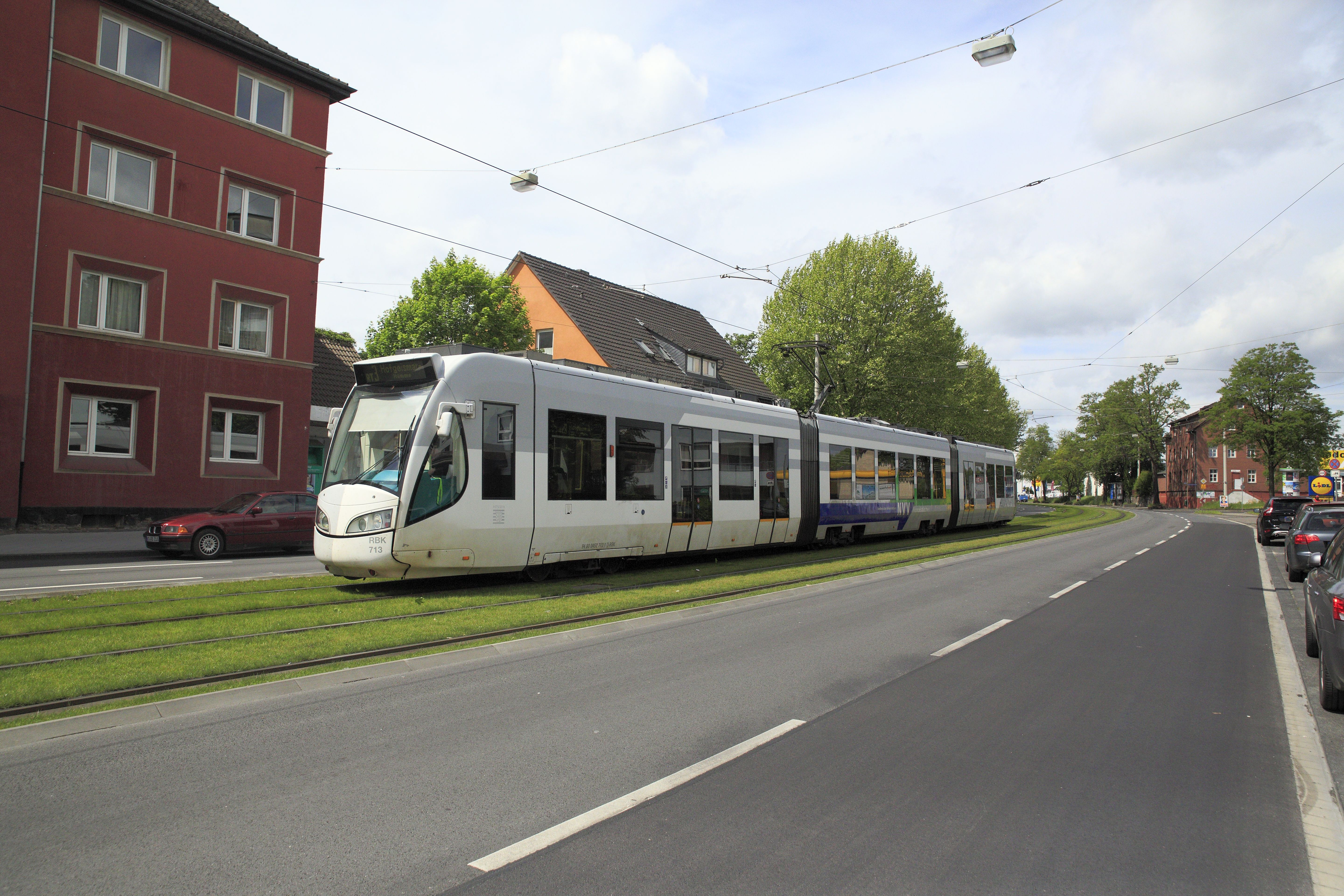 Zug der Linie RT 3 nach Hofgeismar-Hümme auf dem besonderen Bahnkörper der Holländischen Straße.